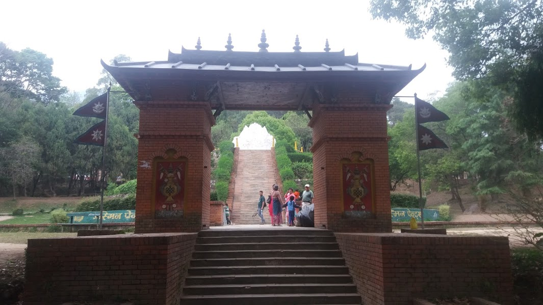 नेपाली: त्रिभुवन पार्क